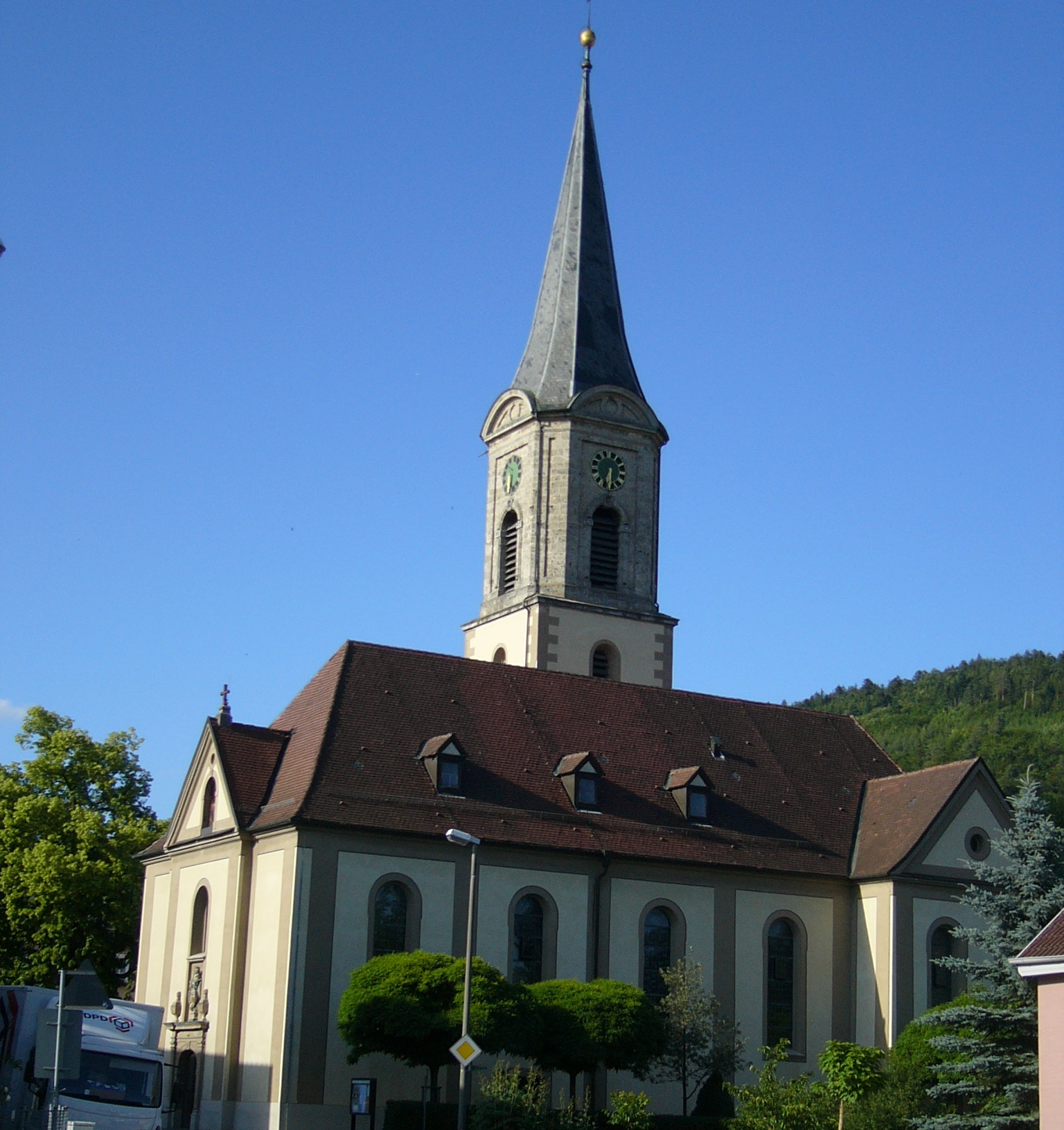 Kirche St. Gallus in Wurmlingen bei Tuttlingen